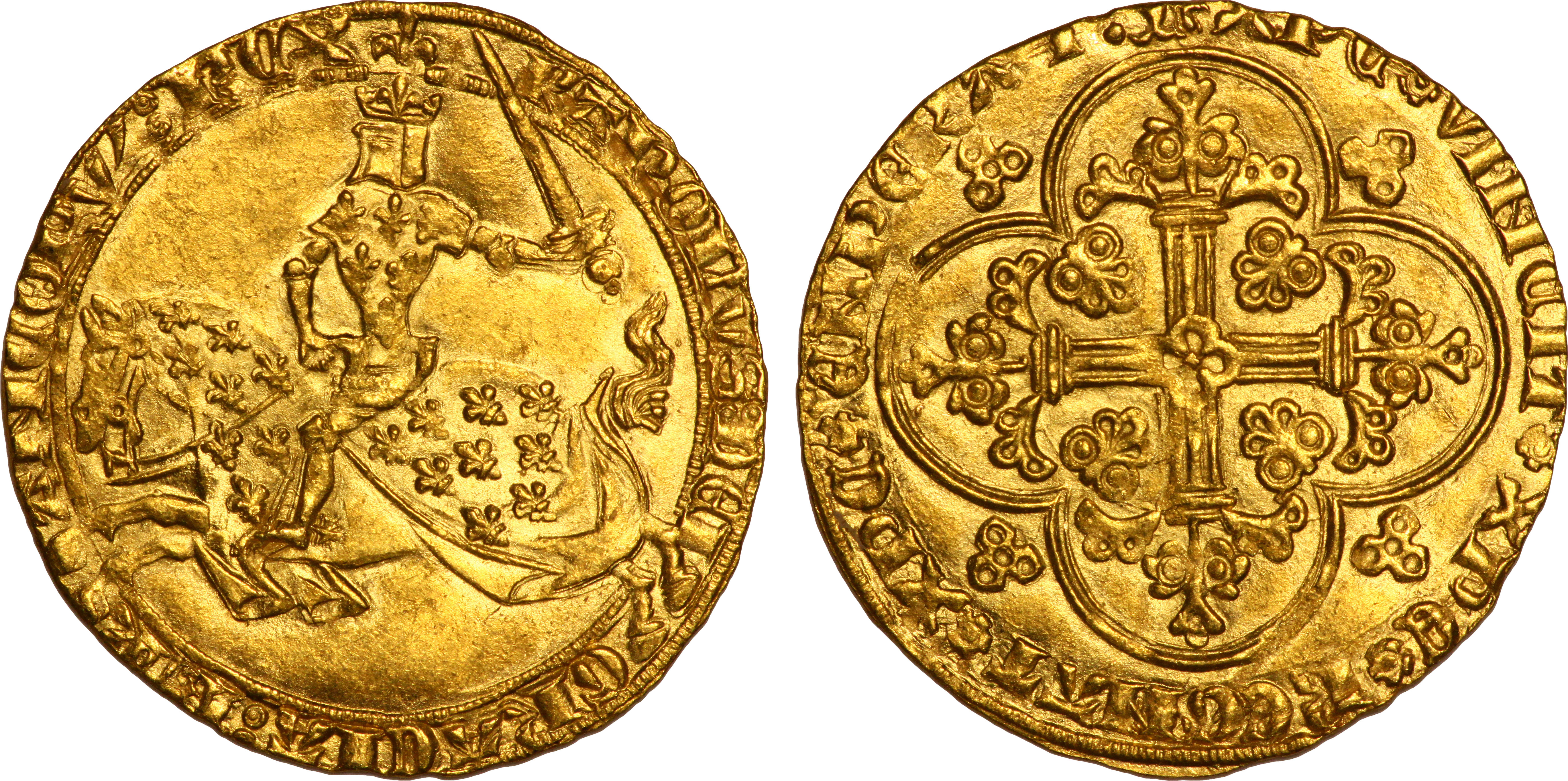 Métal : or Diamètre : 27,5mm Axe des coins : 6h. Poids : 3,80g. Titulature avers : KAROLVS: DEI - GRACIA: FR-ANCORV’: REX, (ponctuation par deux annelets pointés superposés). Description avers : Charles V à cheval, galopant à gauche, l'épée haute, coiffé d'un heaume couronné sommé d'un lis, portant par-dessus sa cotte de mailles une cotte d'armes fleurdelisée ; le caparaçon du cheval est fleurdelisé. Traduction avers : (Charles, par la grâce de Dieu, roi des Francs). Titulature revers : (Dauphin à gauche) XPC* VINCIT* XPC* REGNAT* XPC* ENPERAT, (ponctuation par de simples roses à 5 pétales). Description revers : Croix feuillue avec quadrilobe en cœur, dans un quadrilobe orné de palmettes et cantonné de quatre trèfles évidés. Traduction revers : (Le Christ vainc, le Christ règne, le Christ commande). Fabrication: 3 September 1364